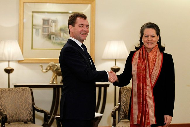 С председателем партии «Индийский национальный конгресс» Соней Ганди.